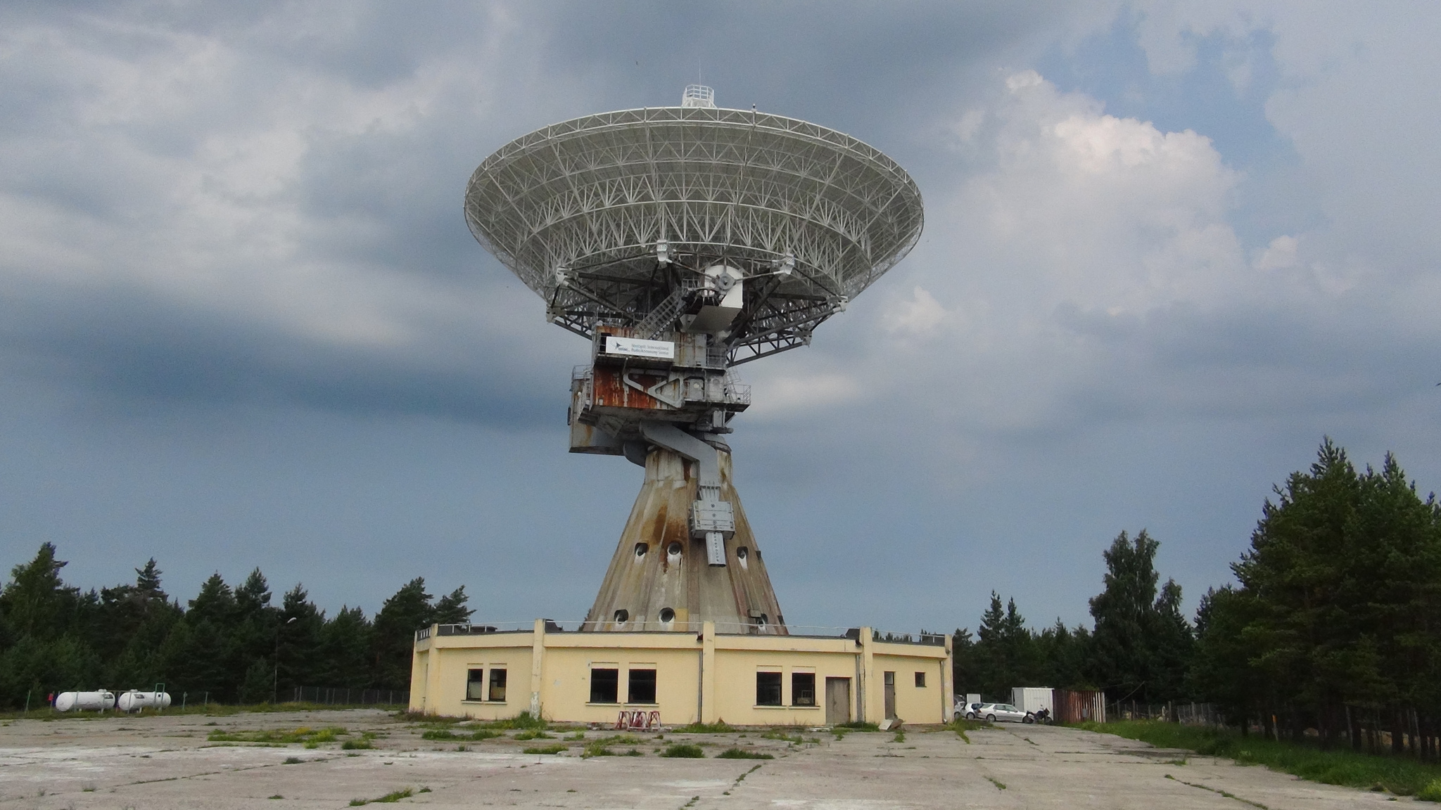 Selliseid raadioteleskoope ehitati Nõukogude Liidu ajal kokku 3 tükki.